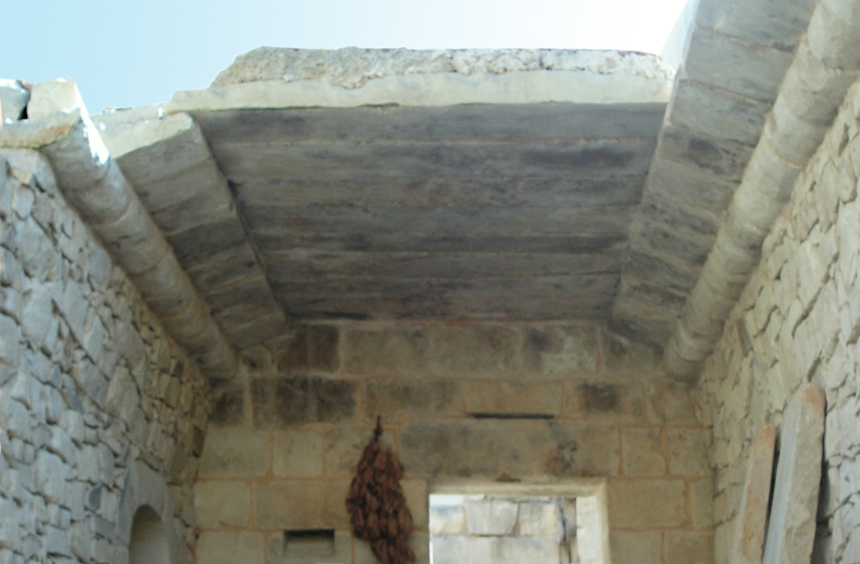 terrasse traditionnelle d'une ferme maltaise